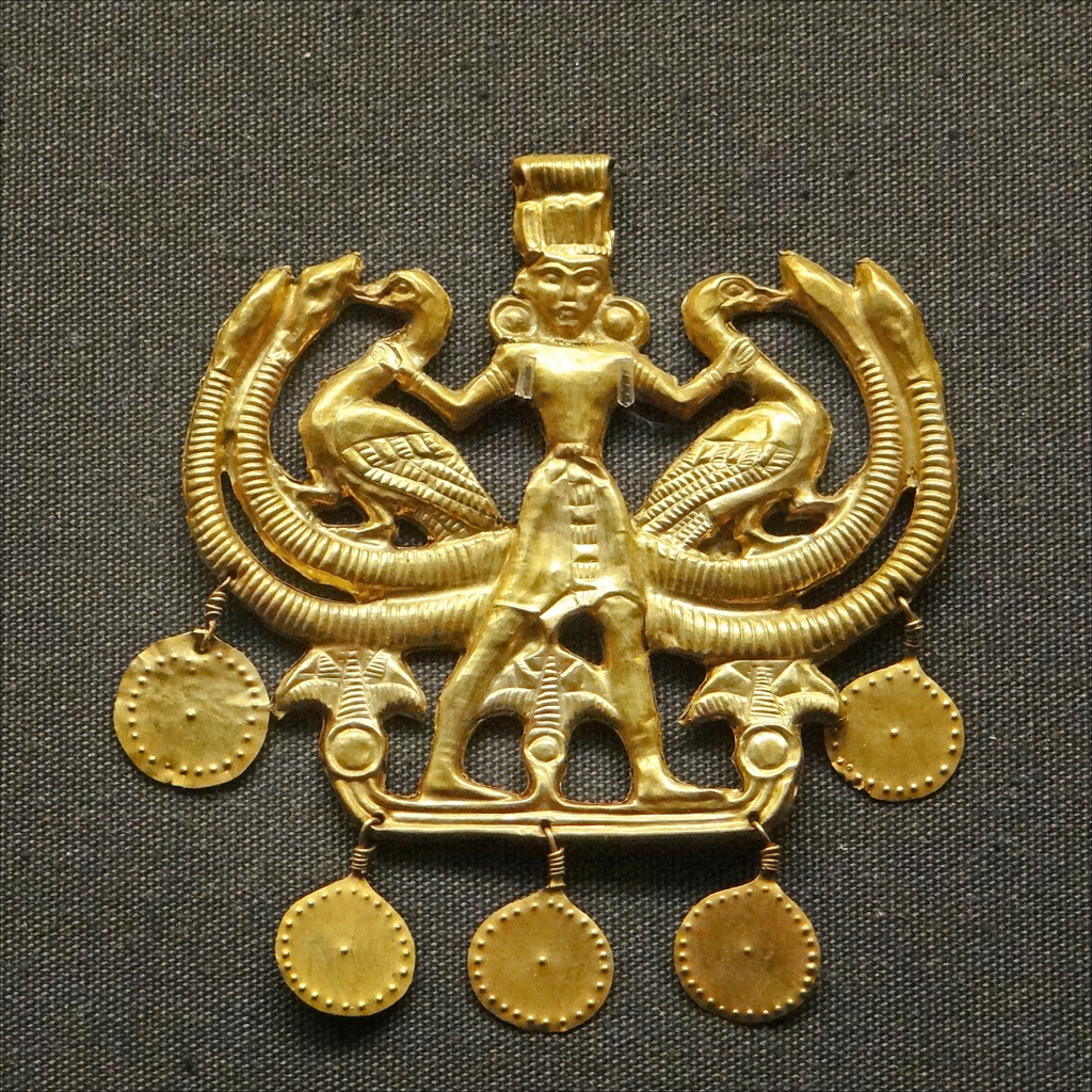 Le Maître des Animaux, Dieu crétois de la Nature Le Dieu tient un oiseau aquatique dans chaque main, il est entouré d'une ornementation stylisée. On remarque une influence égyptienne dans les fleurs de lotus aux pieds du personnage. Pendentif minoen en or vers 1700-1500 avant J.-C. Trésor d'Aegina Salles Grèce et Rome antiques (British Museum)